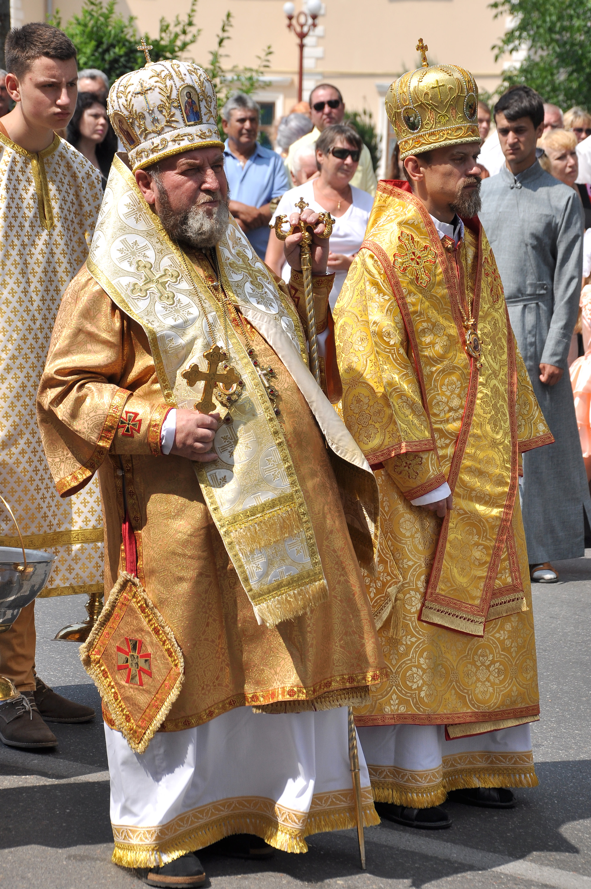 Молитовна хода «Стації митрополита Андрея», яка пройшла вулицями м. Тернополя 26 липня 2015 року на вшанування митрополита УГКЦ Андрея Шептицького. Архієпископ і митрополит Тернопільсько-Зборівський Василь (Семенюк) і єпископ-помічник Тернопільсько-Зборівський Теодор (Мартинюк) (УГКЦ).